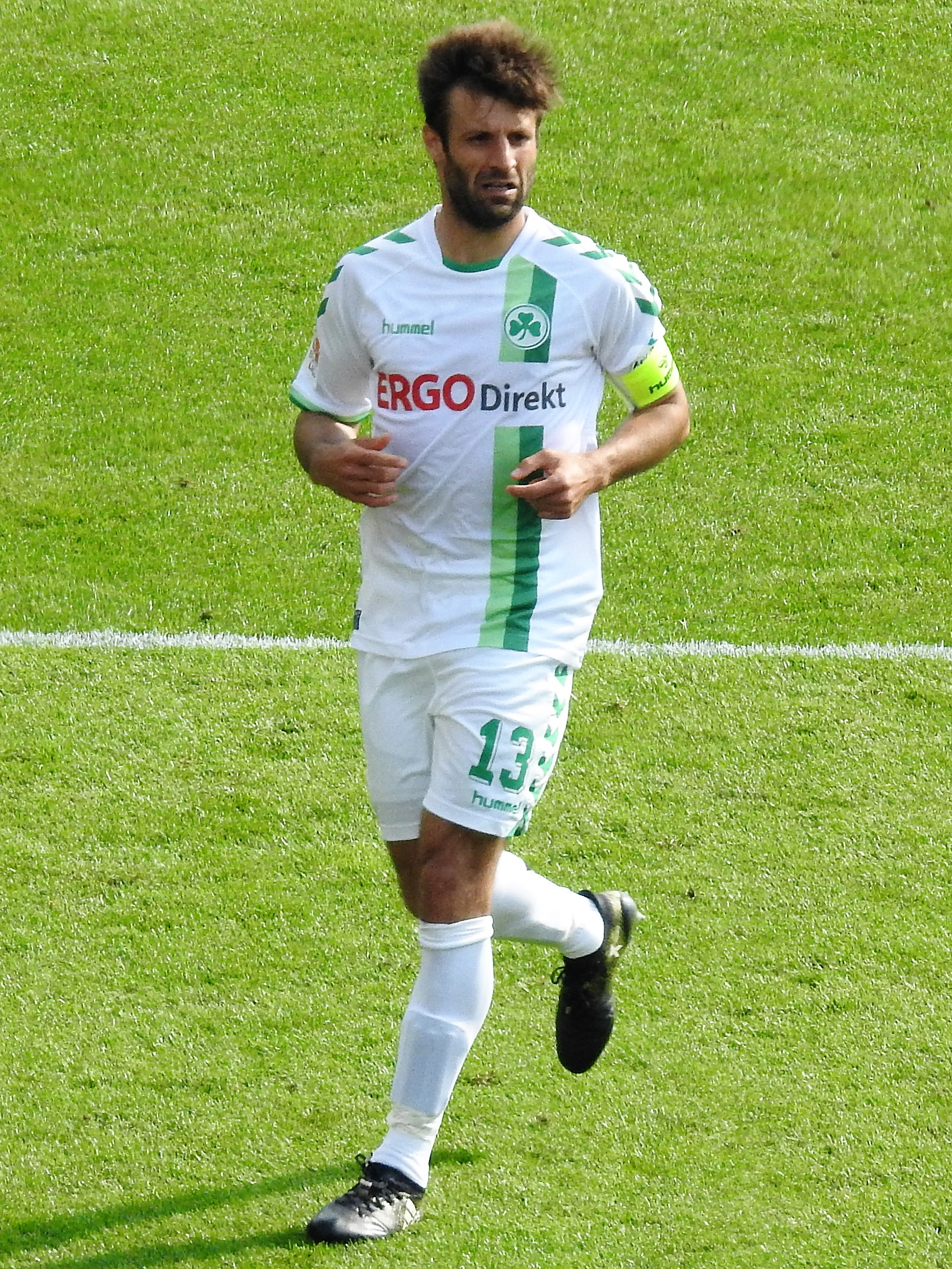 Marco Caligiuri SpVgg Fürth